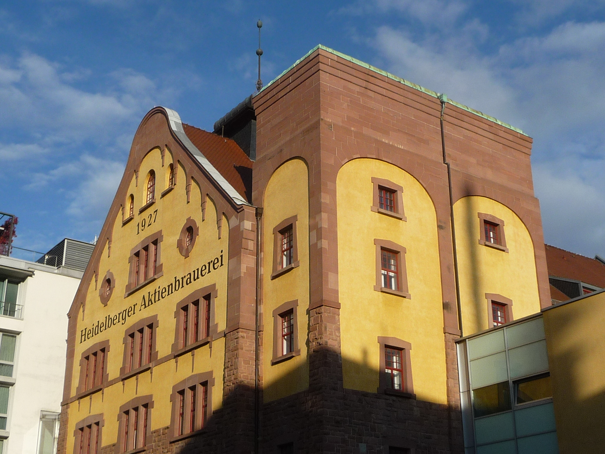 ehemalige Heidelberger Aktienbrauerei, heute NH Hotel